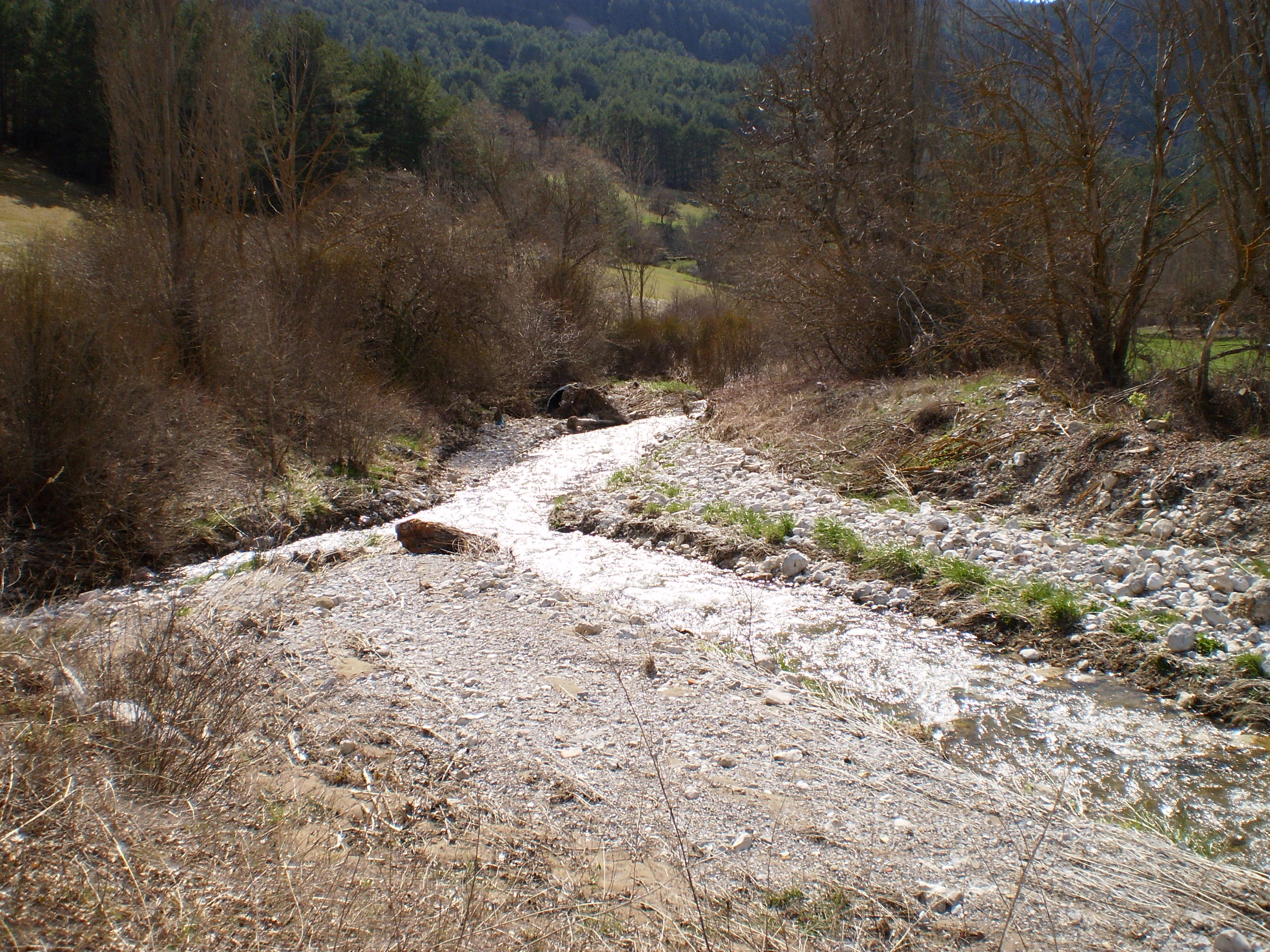 Confluència dels rius de Mola i de Josa.